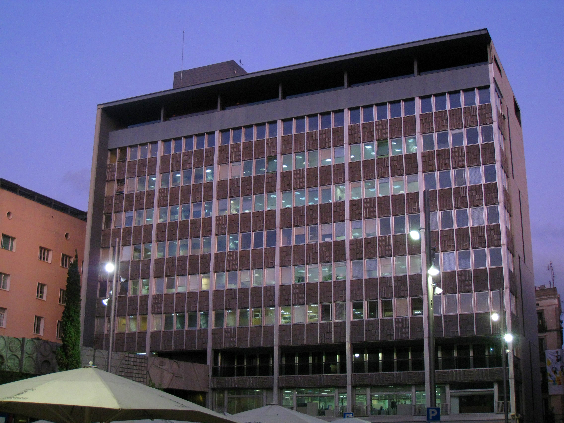 L'edifici Novíssim de l'Ajuntament de Barcelona (Llorenç García-Barbón i Enric Giralt i Ortet, 1962-69), a la plaça de Sant Miquel